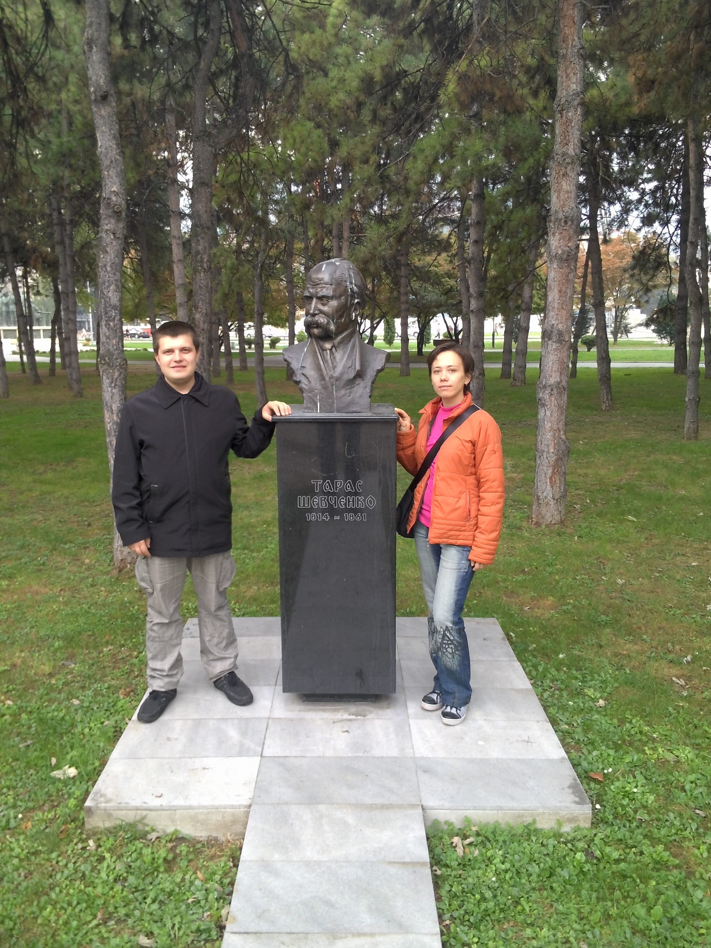 Євген Букет і Анна Багряна біля пам'ятника Шевченку у Скоп'є